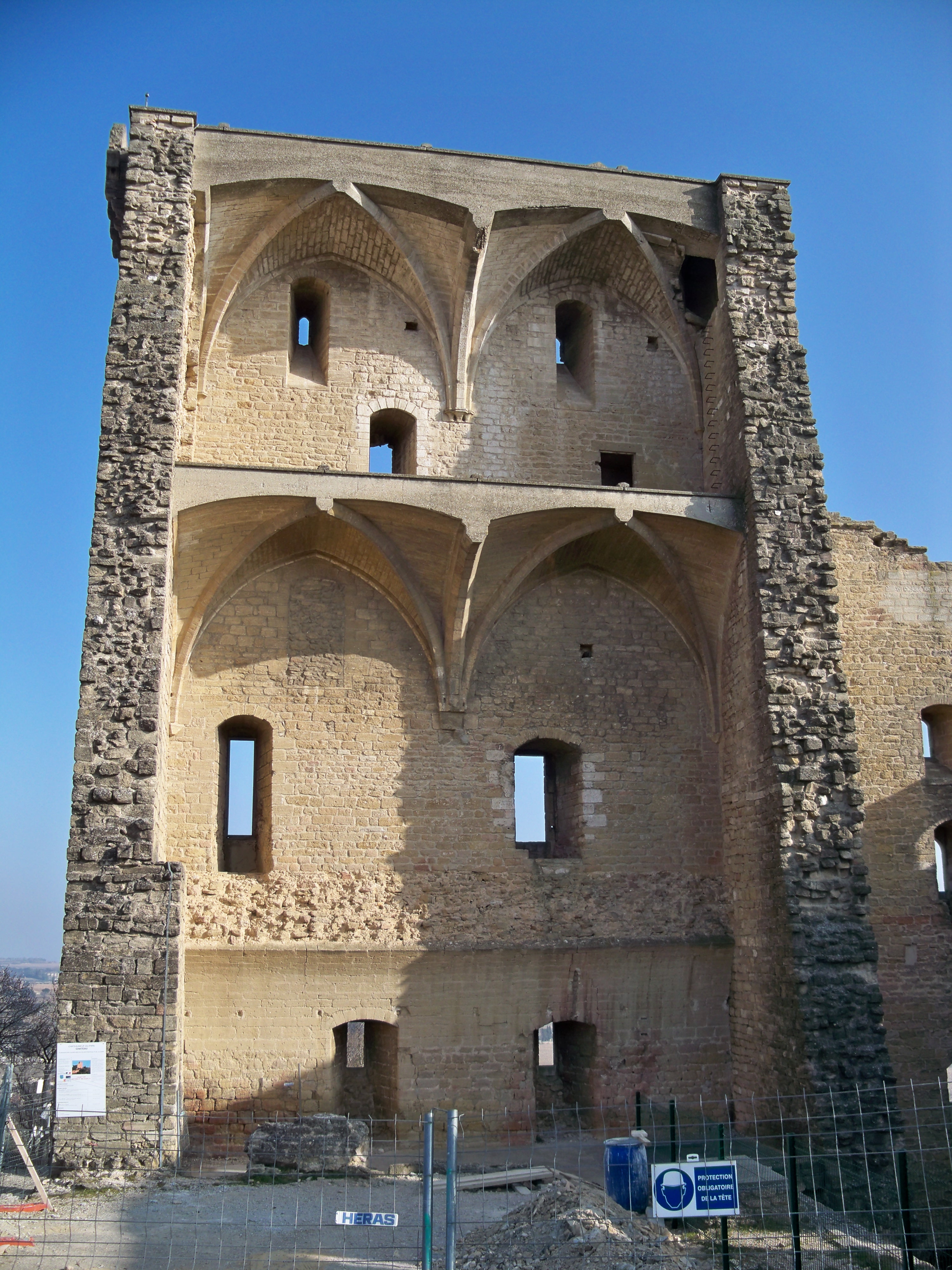 Chateau de Chateauneuf des Papes, Vaucluse, France